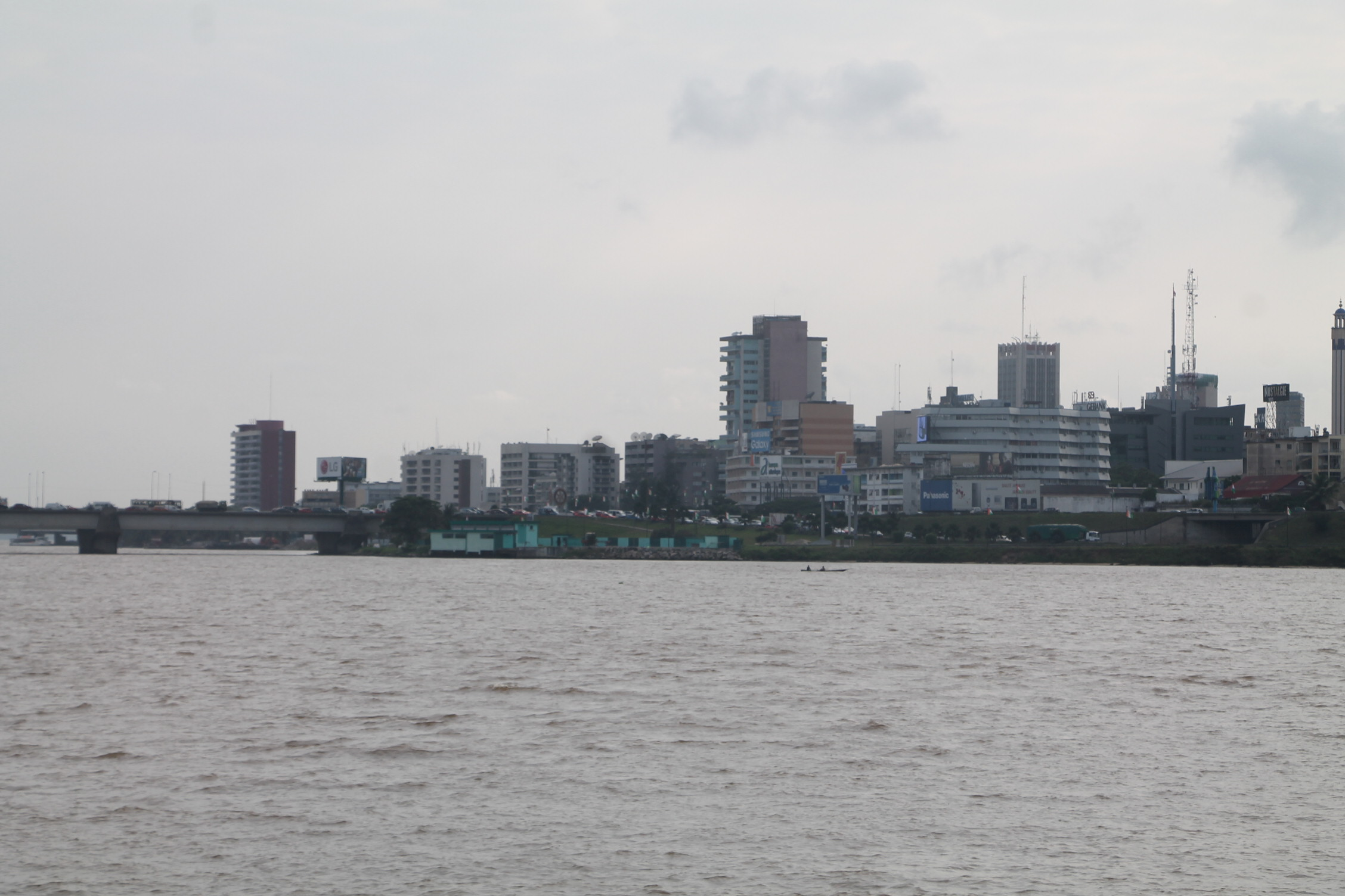 La belle ville d'Abidjan vue du coté de Blauckauss